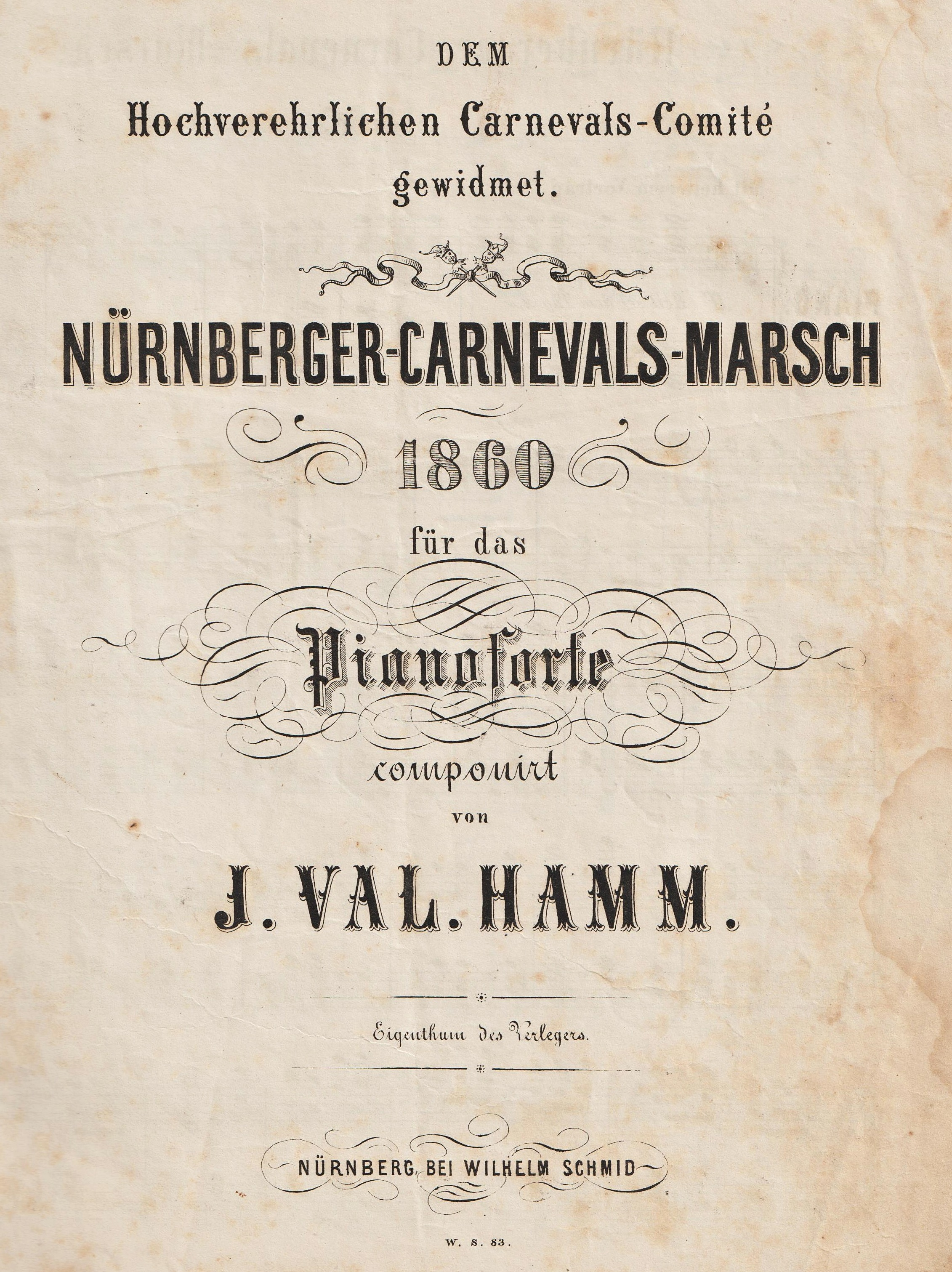 Titelblatt eines Marsches von Johann Valentin Hamm, 1860